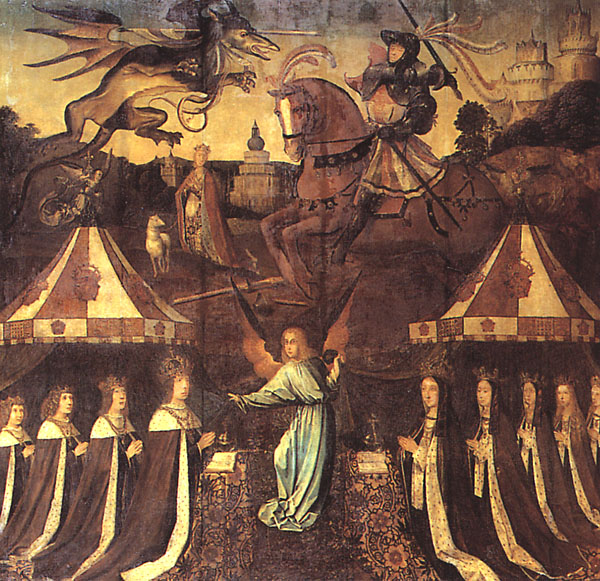 Heinrich VII. von England und Elizabeth von York mit ihren sieben Kindern (auch die frühverstorbenen Kinder Edmund, Katherine und Elizabeth; The Royal Collection